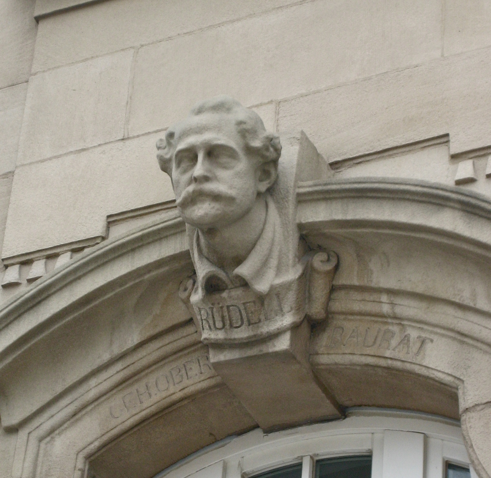 Büste des Architekten Alexander Rüdell (1852-1920) am Bahnhofsgebäude von Luxemburg-Stadt, für dessen Bau er verantwortlich war. Die Büste wurde 1913 vom Bildhauer Arthur Lewin-Funcke (1866-1937) angefertigt.